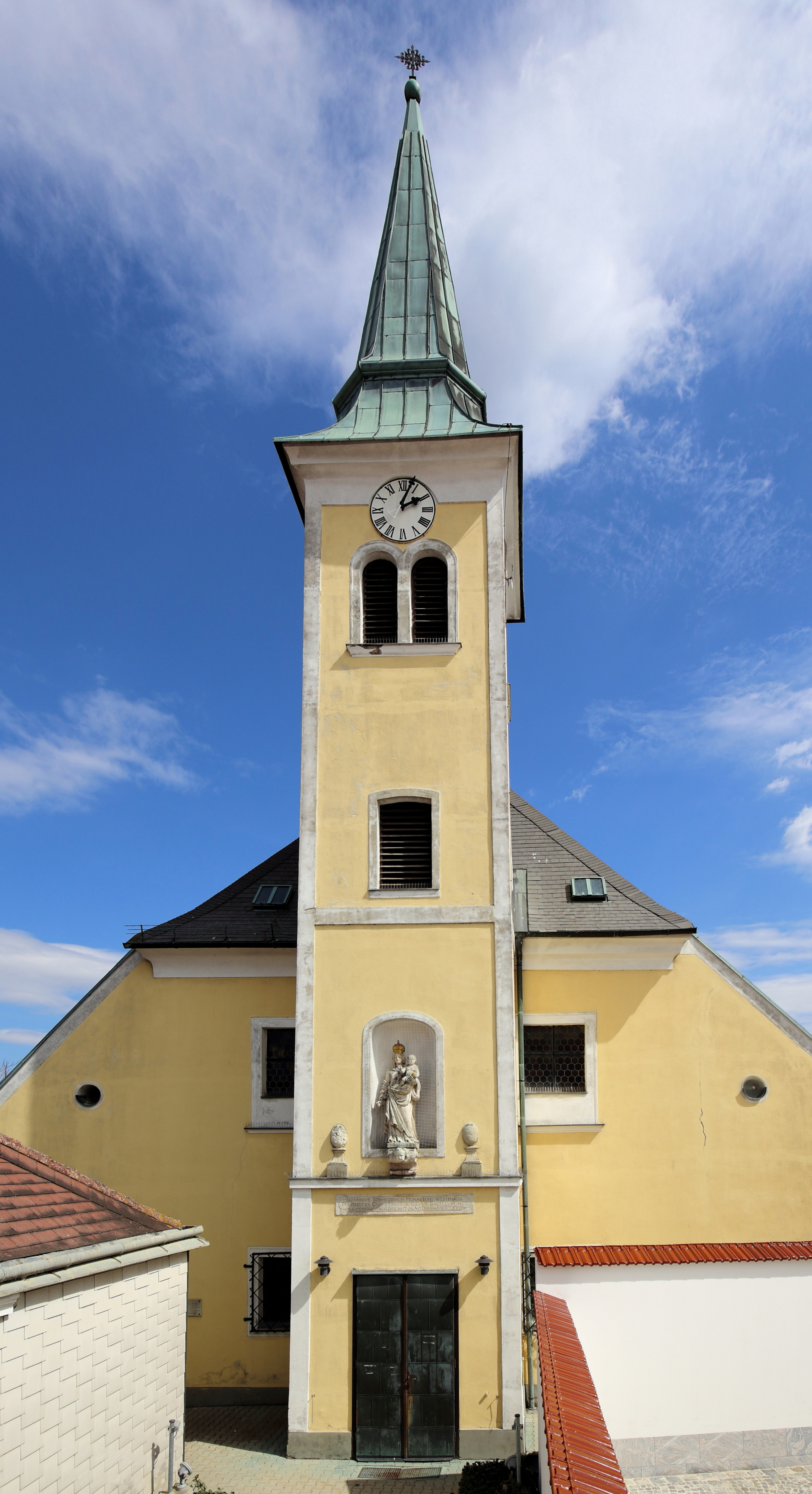 Ortskapelle hl. Anna in der niederösterreichischen Marktgemeinde Hagenbrunn. Die Kapelle wurde 1673 errichte und war ursprünglich eine Schlosskapelle. Das Schloss wurde 1802 abgetragen. Der viergeschossige vorgelagerte Fassadenturm mit Putzfaschen, rundbogige Schallfenstern und abgesetztem Pyramidendach stammt aus dem Jahr 1865.